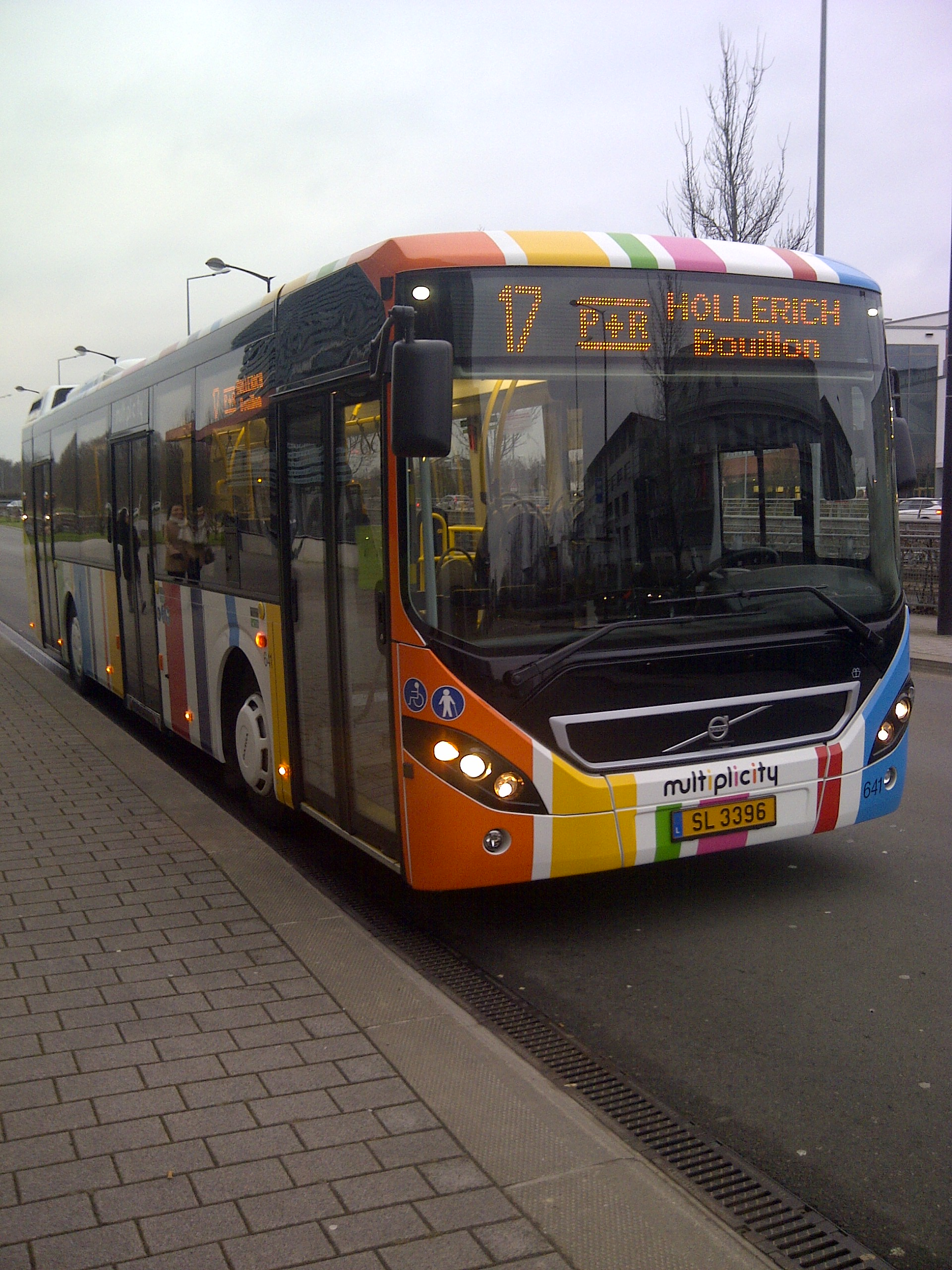 Bus FRISCH RAMBROUCH fir d'AVL (Autobus de la Ville de Luxembourg) op der Linn 17 #641 (SL 3396).